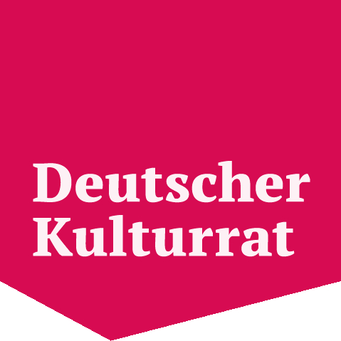 aktuelles Logo